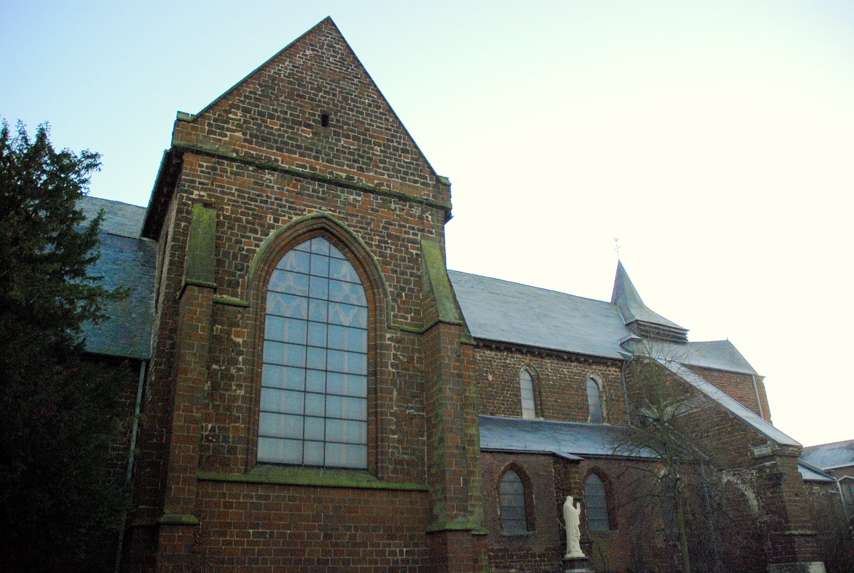 De Onze-Lieve-Vrouwekerk te Diest, België